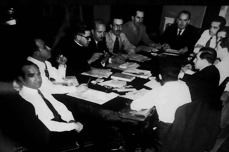 Fotografía de la Junta Fundadora de la Segunda República, en dominio público por parte del gobierno de Costa Rica, Ministerio de Cultura y Juventud de Costa Rica (Archivo)